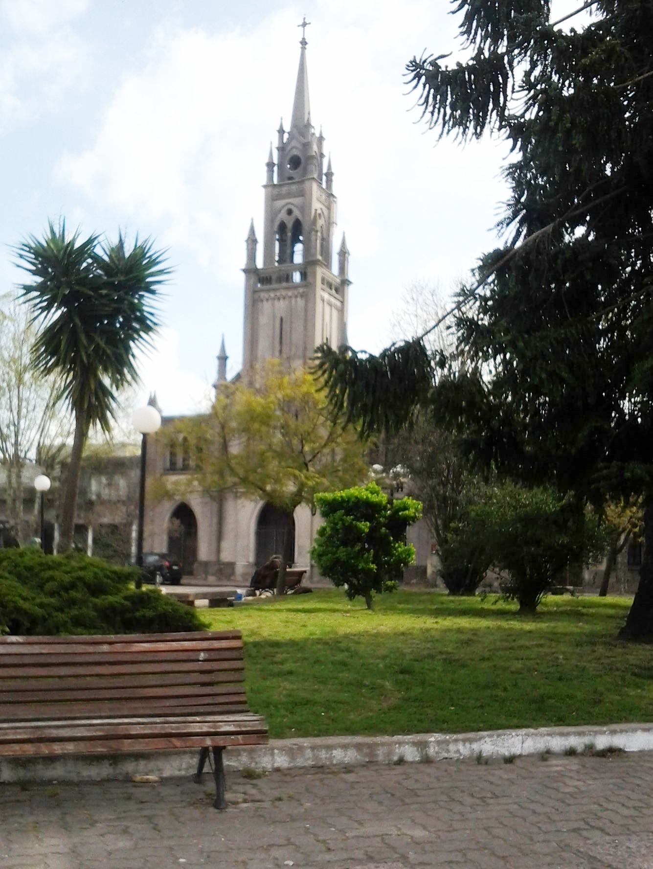 Plaza y Parroquia de la ciudad de La Paz (Canelones-Uruguay)